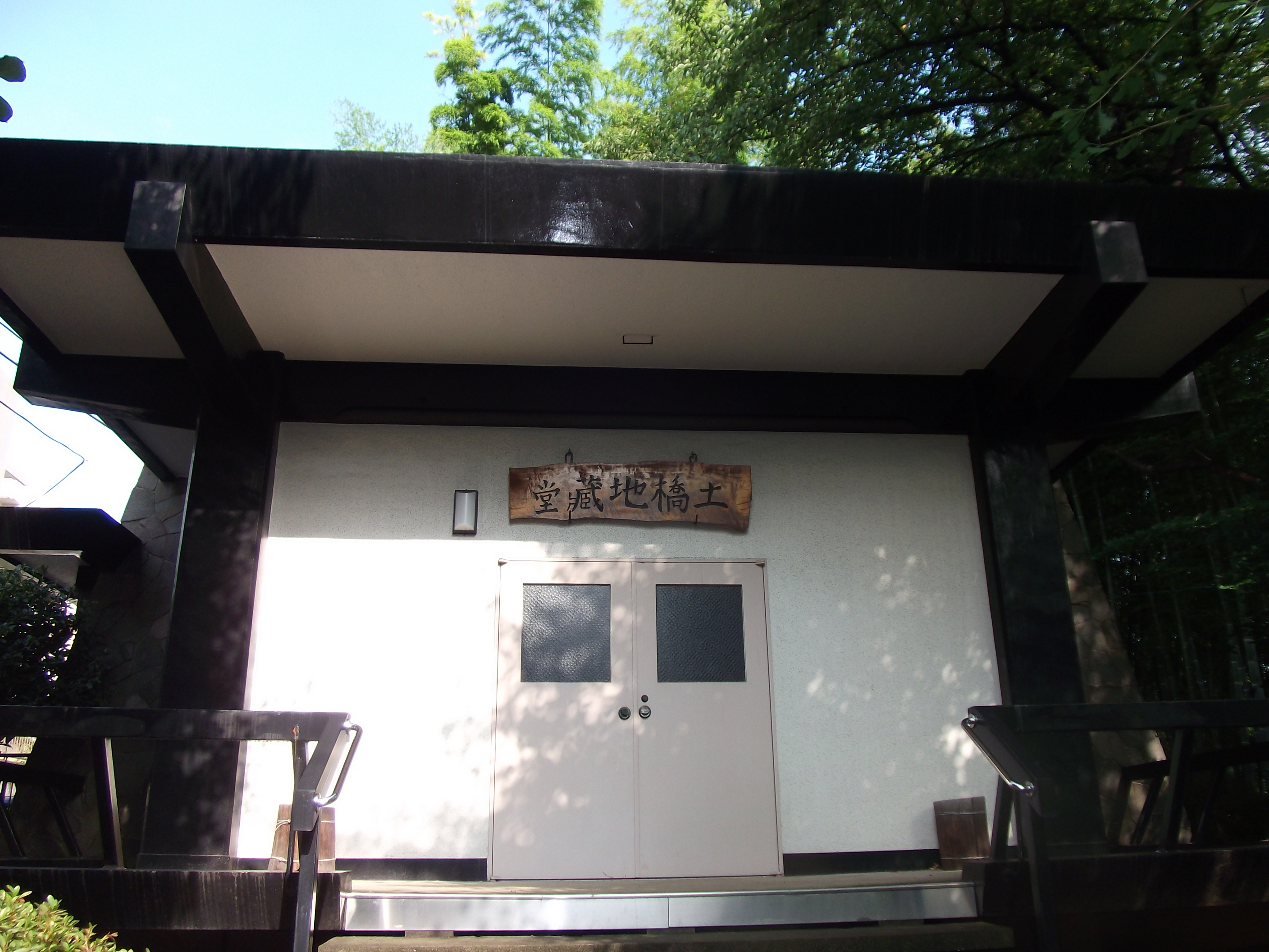 土橋地蔵堂（神奈川県川崎市宮前区）、2011年8月5日撮影。